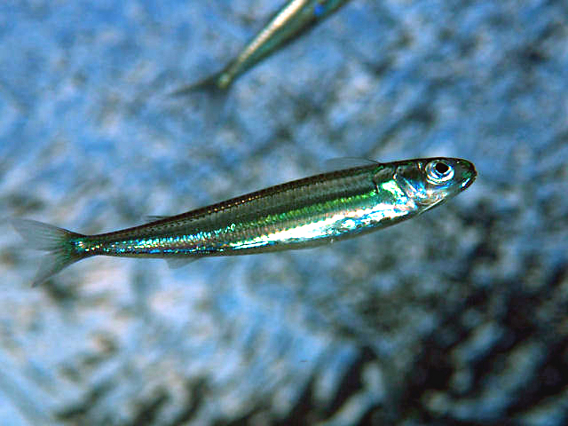 ギンイソイワシ Hypoatherina tsurugae